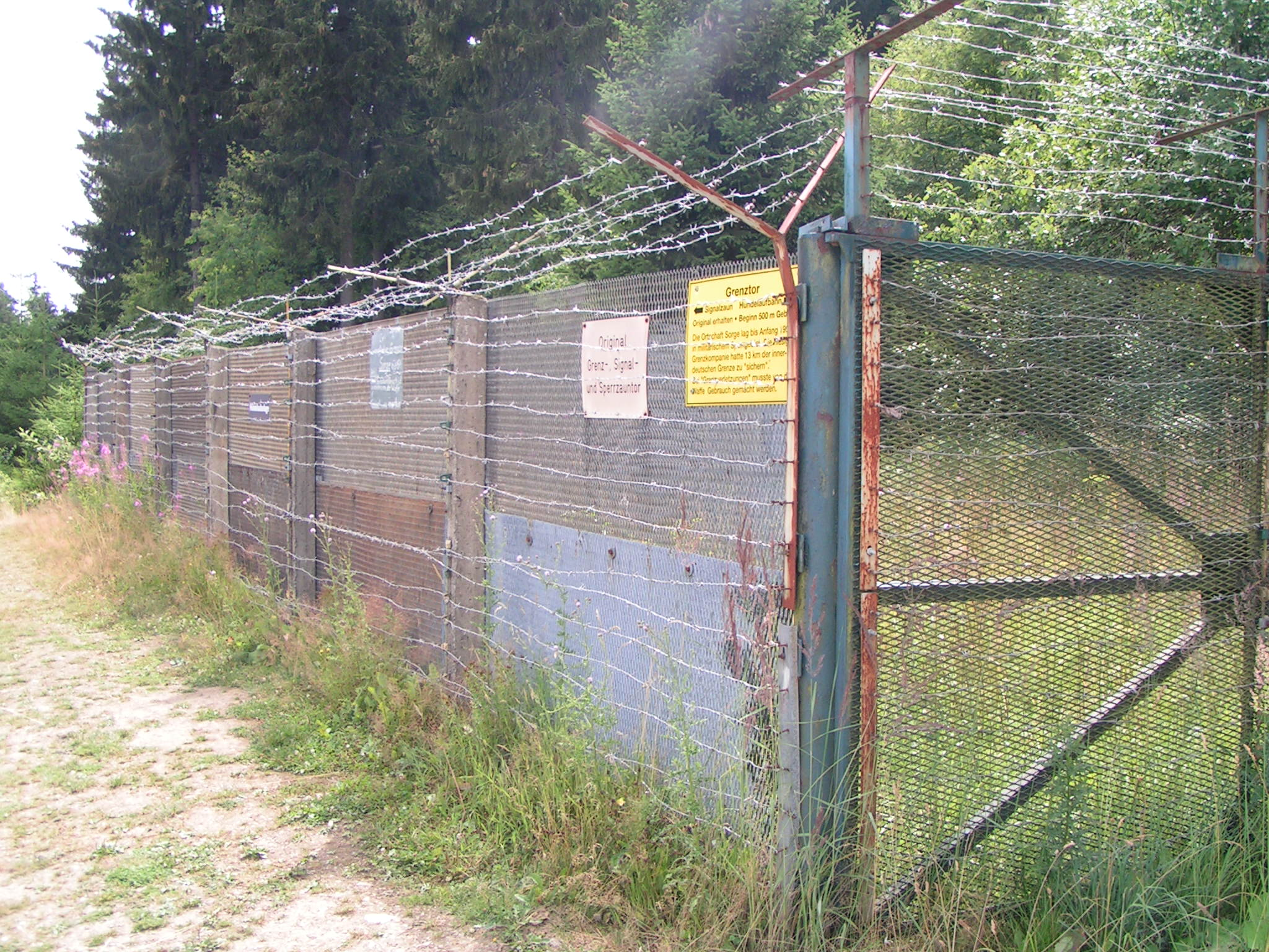 Grenzmuseum Sorge: Überreste des inneren Sperrzauns